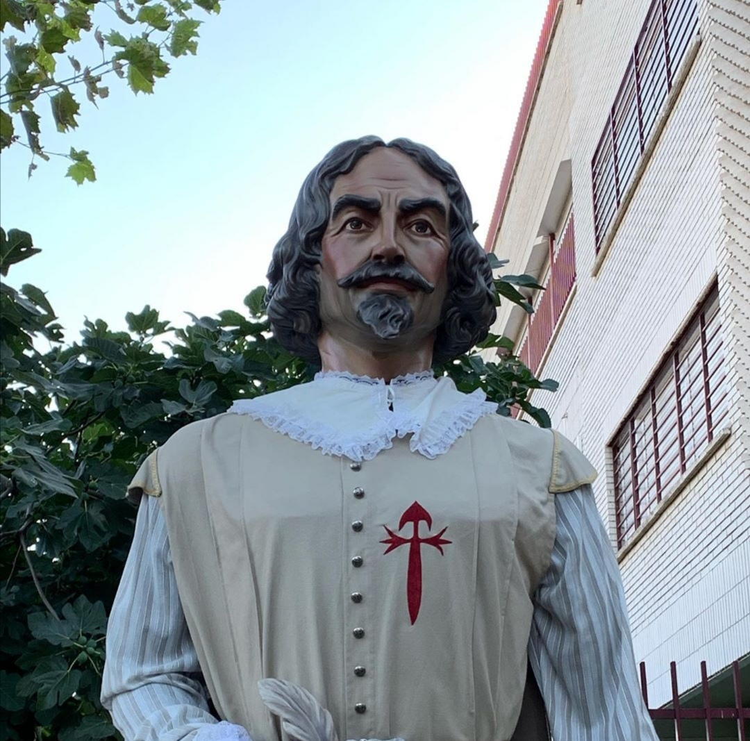 Gigante representa el personaje